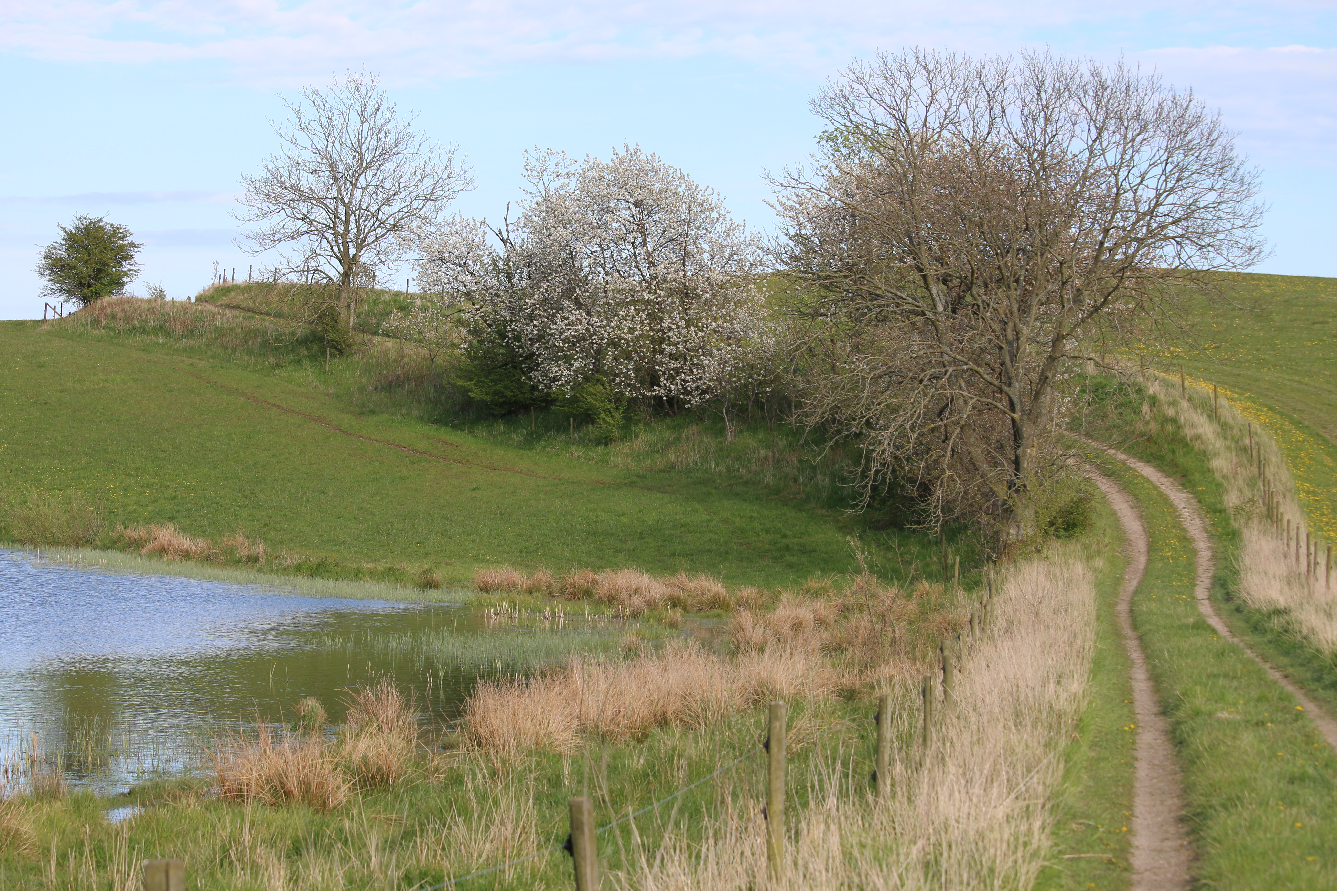 Svartskylle naturreservat maj 2017